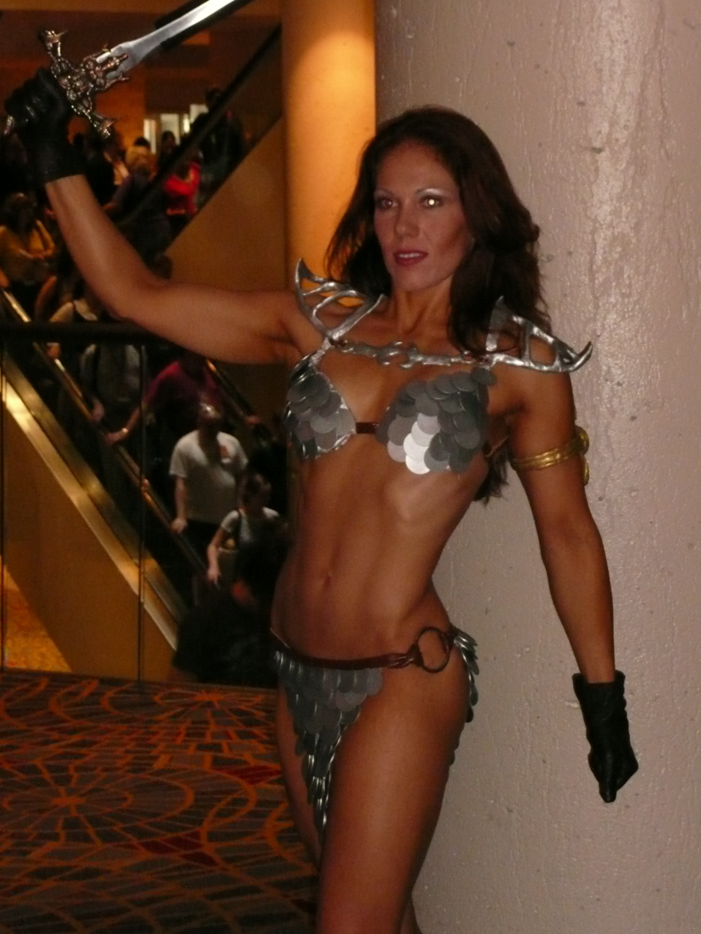 Red Sonja